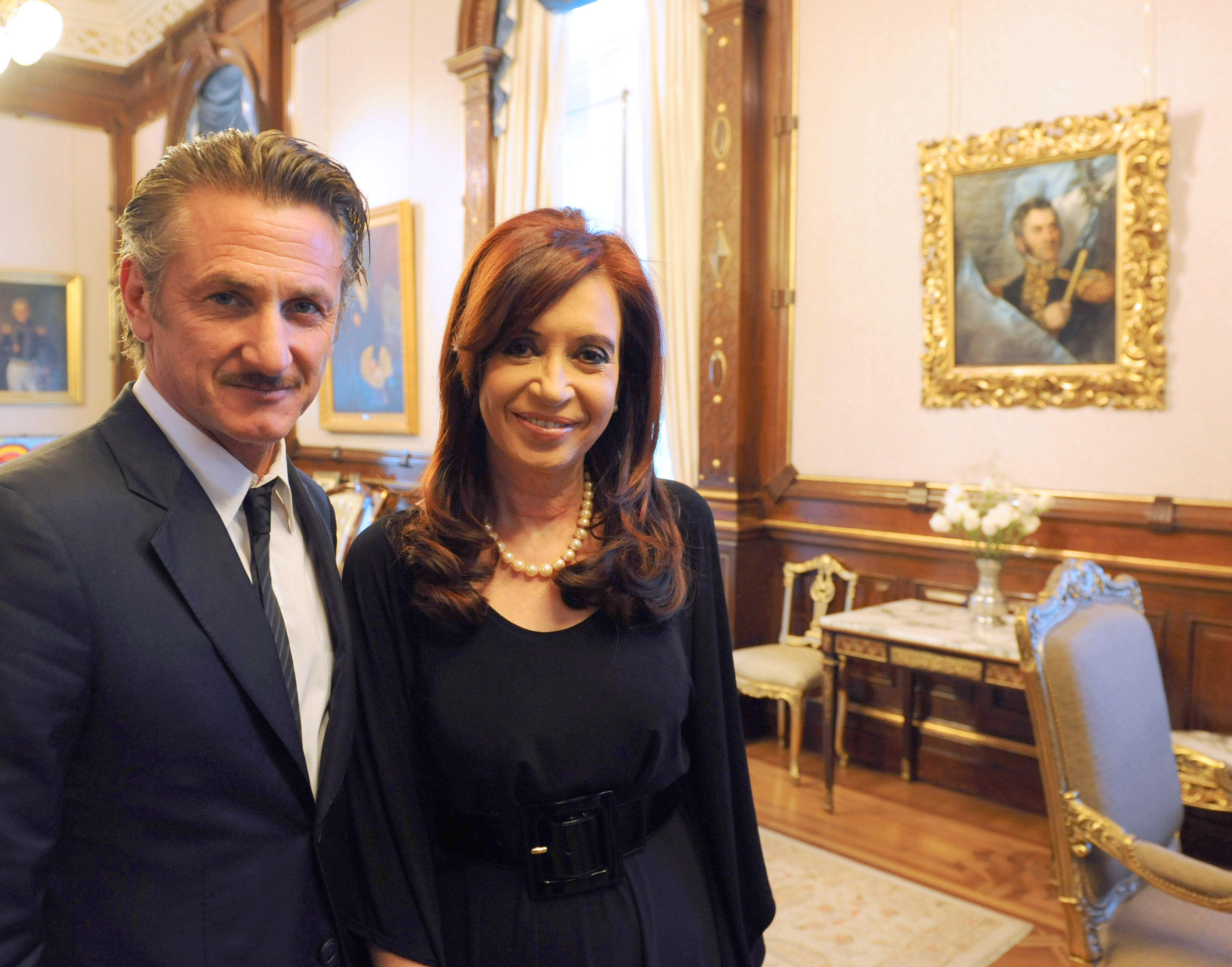 Sean Penn se reunió con la presidenta Cristina Fernández en el marco de su misión humanitaria por Haití